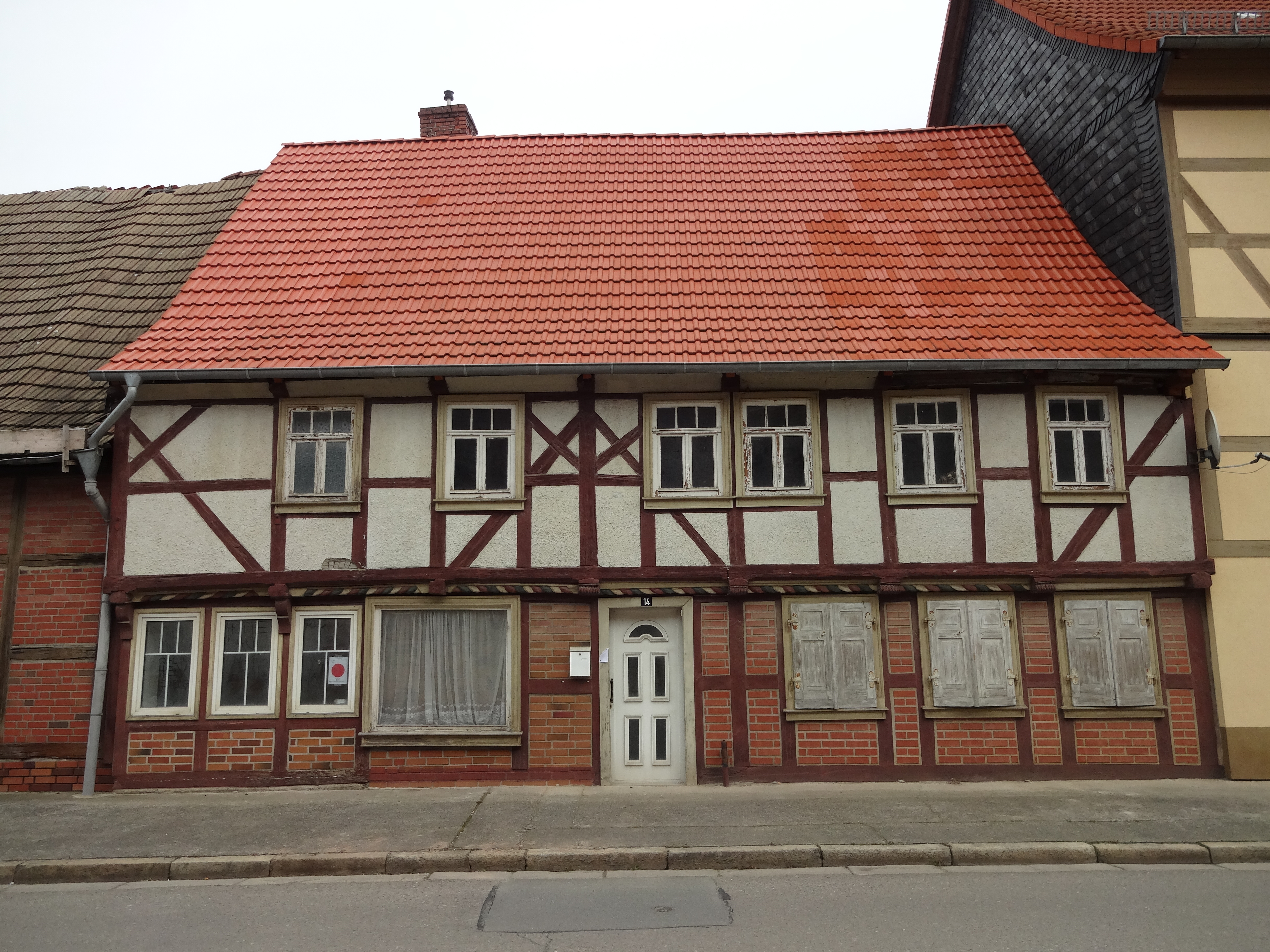 denkmalgeschütztes Fachwerkhaus (Ackerbürgerhof) in der Kornstraße 14 in Derenburg, Ortsteil von Blankenburg (Harz)